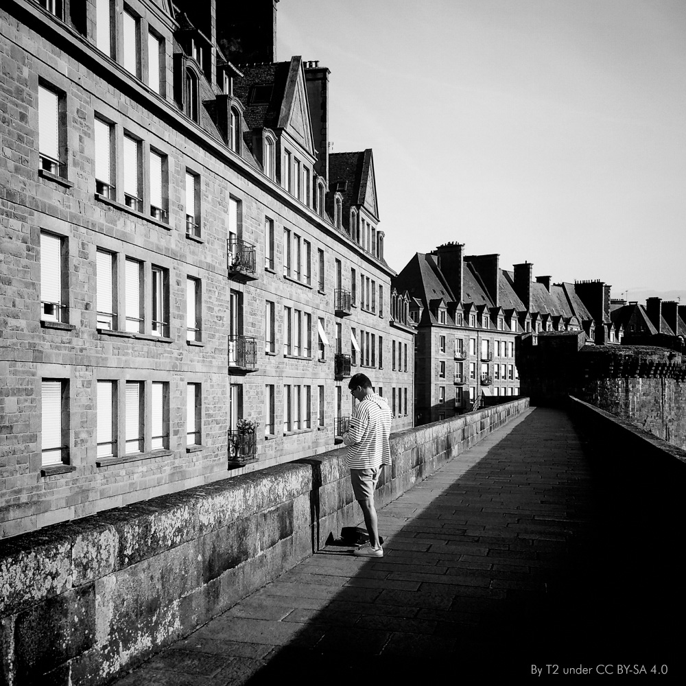 Remparts Est de Saint-Malo et porte Saint-Vincent